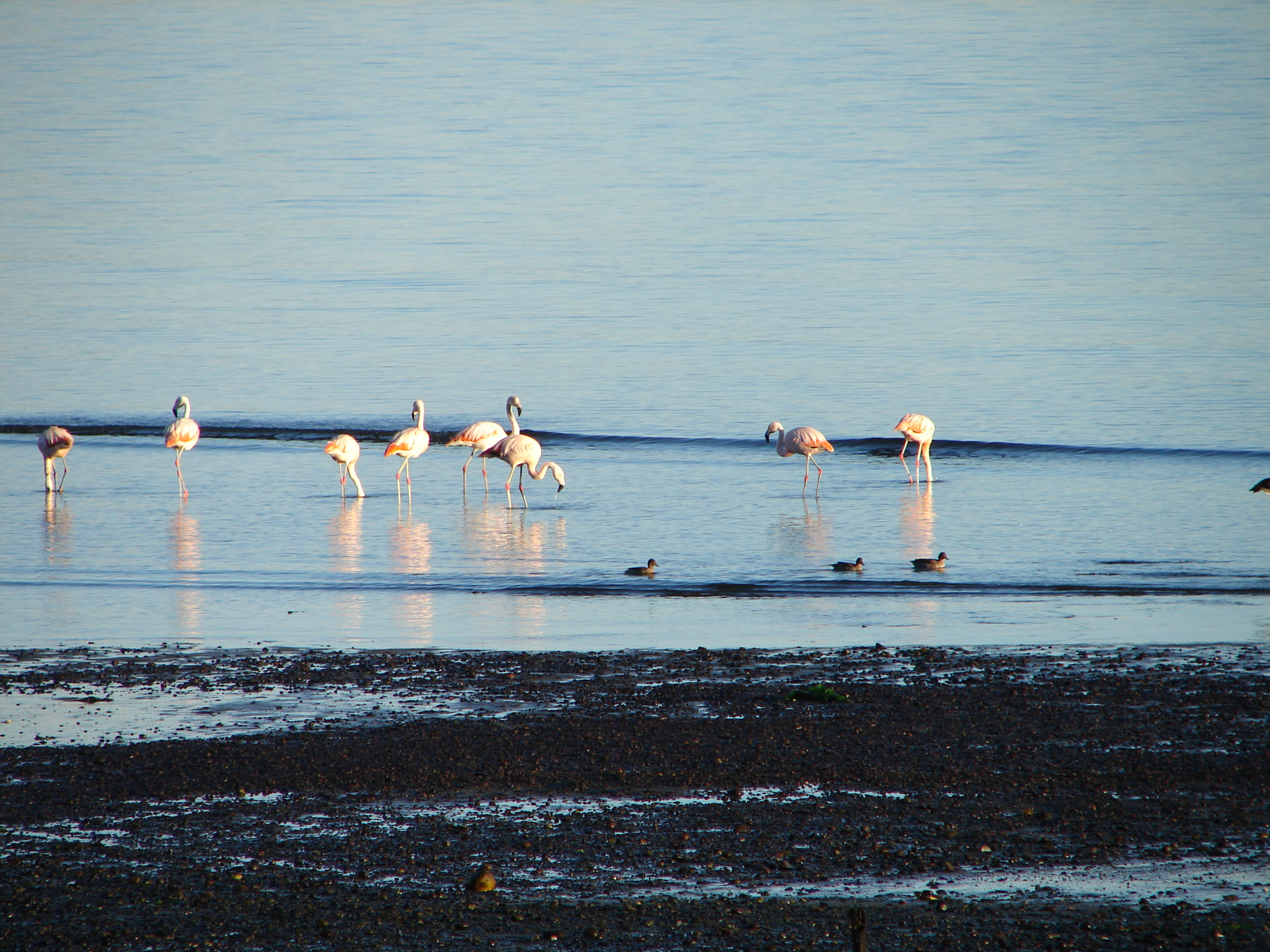 Flamencos Phoenicopterus chilensis en playa de Caulín, Chile.